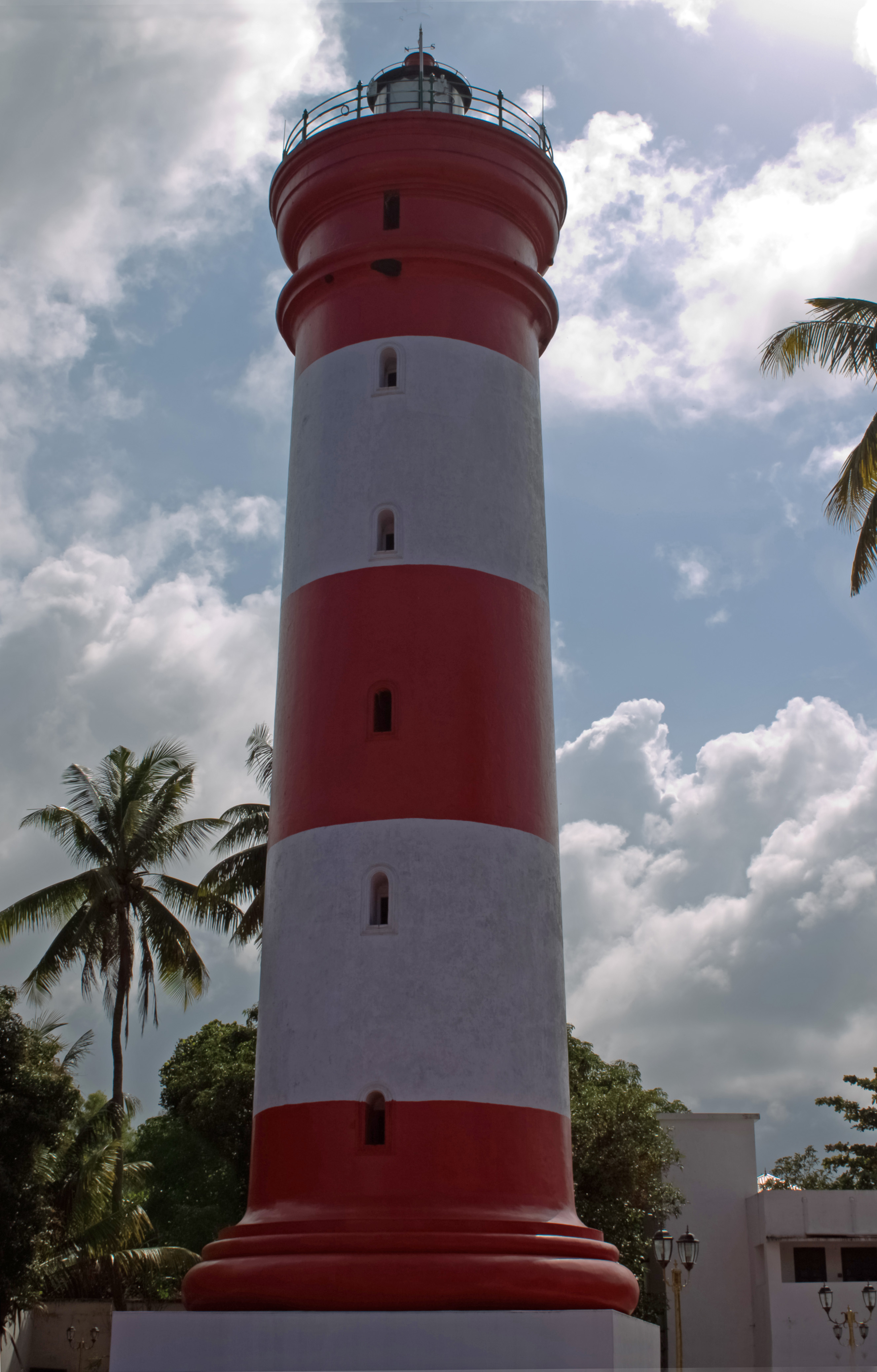 ആലപ്പുഴയിലെ വിളക്കുമാടം